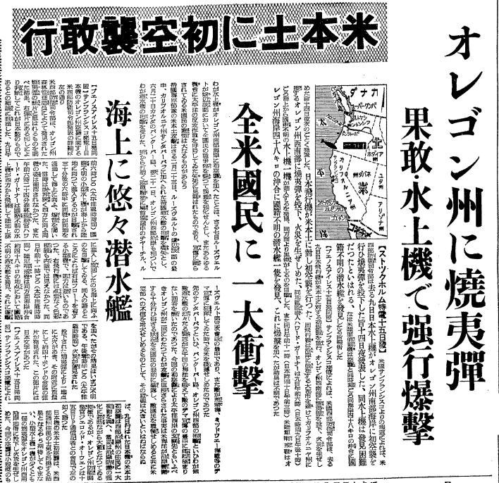 1942年（昭和17年）9月9日の日本海軍によるオレゴン州に対する空襲を報道する新聞記事。